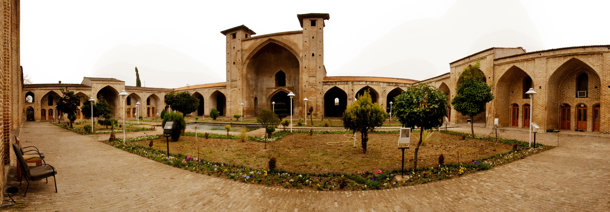 مجموعه فرح‌آباد